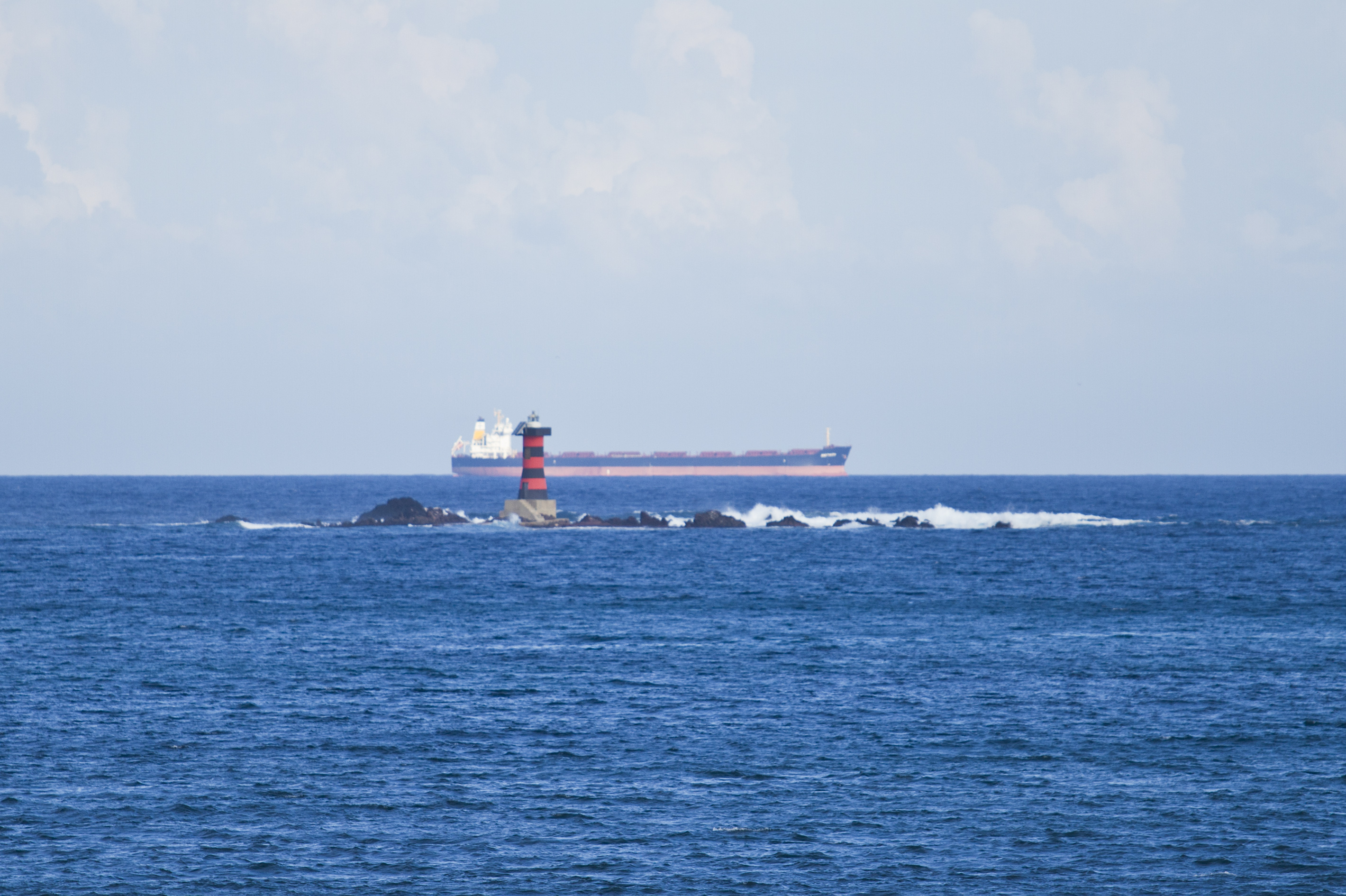 Portoscuso faro, Portovesme CI, Sardinia, Italy